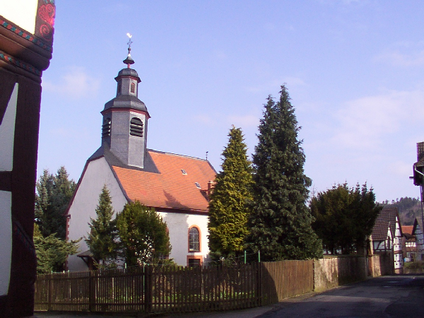 Evangelische Kirche in Bleichenbach, einem Stadtteil von Ortenberg im Wetteraukreis, Deutschland